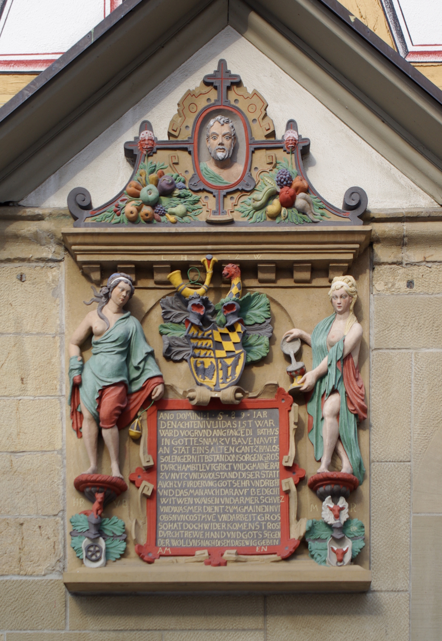 Möckmühl, Rathaus, Schrifttafel In der Mitte das württembergische Herzogwappen mit den drei Hirschstangen, der Markgröninger Reichssturmfahne, den Fischen von Mömpelgard und den Wecken von Teck. Die Inschrift lautet: ANO DOMINI 1589 IAR Im Jahre 1589 DEN ACHTEN IULII DAS IST WAR am achten Juli, das ist wahr WARD VO GRUND ANGEFANGE DI RATHUS wurde der Grundstein gelegt für das Rathaus IN GOTTES NAM ZU BAUEN AUFF in Gottes Namen aufzubauen AN STAT EINS ALTEN GANTZ BAULOS an Stelle eines alten ganz baufälligen SO LENGER NIT BESTAND ON SORGEN GROS das nicht länger bestehen konnte ohne große Sorgen DURCH AMBTLEUTGERICT UND GMAINE RAT Amtleute (Amtmänner), Gericht und Gemeinderat ZU NUTZ UND WOLSTAND DISER STATT zum Nutzen und Wohle dieser Stadt, AUCH ZU FURDERUNG GOT SEHR UND RECHT zur Förderung der Ehre Gottes und des Rechts UND DAS MAN AUCH DARAUF BEDECHT und auch das man daran denkt WITWEN WAISEN UND ARMER SCHVEZ Witwen, Waisen und Arme schütze UND WAS MER DIENT ZUM GMAINEN NUT und was dem Gemeinwohl nütze OBS NUN COST MUE UND ARBEIT GROS ob es nun kostet große Mühe und Arbeit SO HAT DOCH WIDER KOMENS TROST so hat es doch den Trost der Auferstehung DURCH TREWE HAND UND GOTS SEGEN durch treue Hand und Gottes Segen DER WOLL UNS NACH DISEM DAS EWIG GEBEN der uns nach diesem das ewige Leben gebe. x